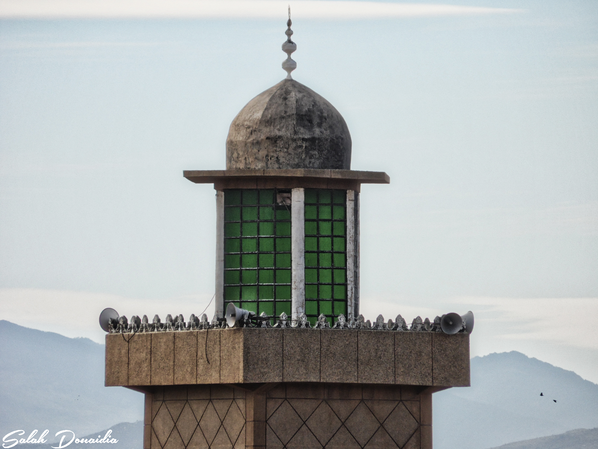 خميس مليانة مسجد العتيق